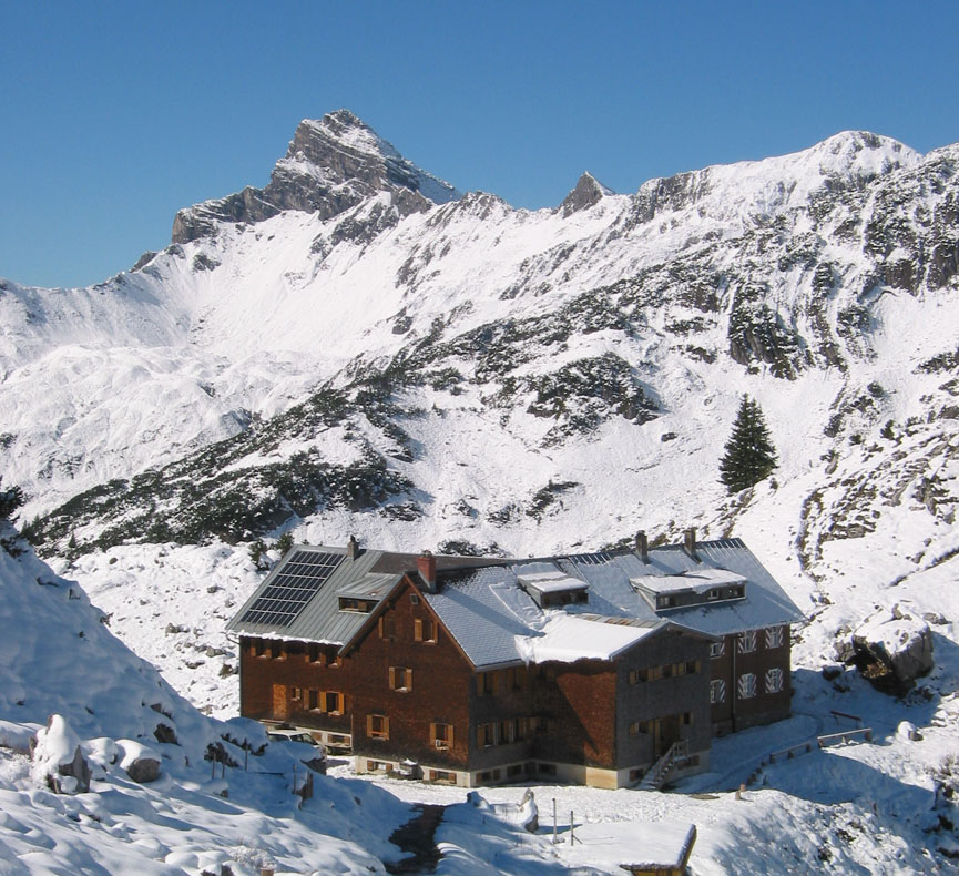 Freiburger Hütte im Herbst 2002, Lechquellgebiet, (Lechtaler Alpen), mit Roggelskopf (2284 m)